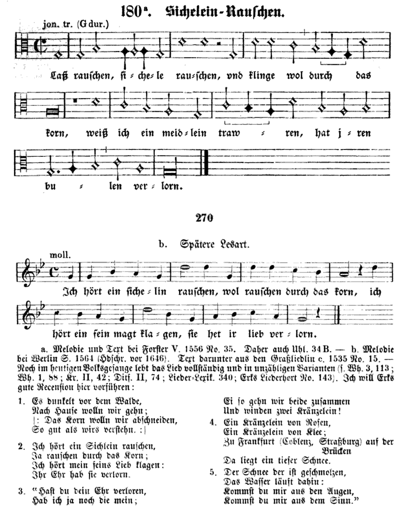 Ich hört' ein Sichelein rauschen (Es dunkelt in dem Walde): Text (trad.), Melodie (trad.)